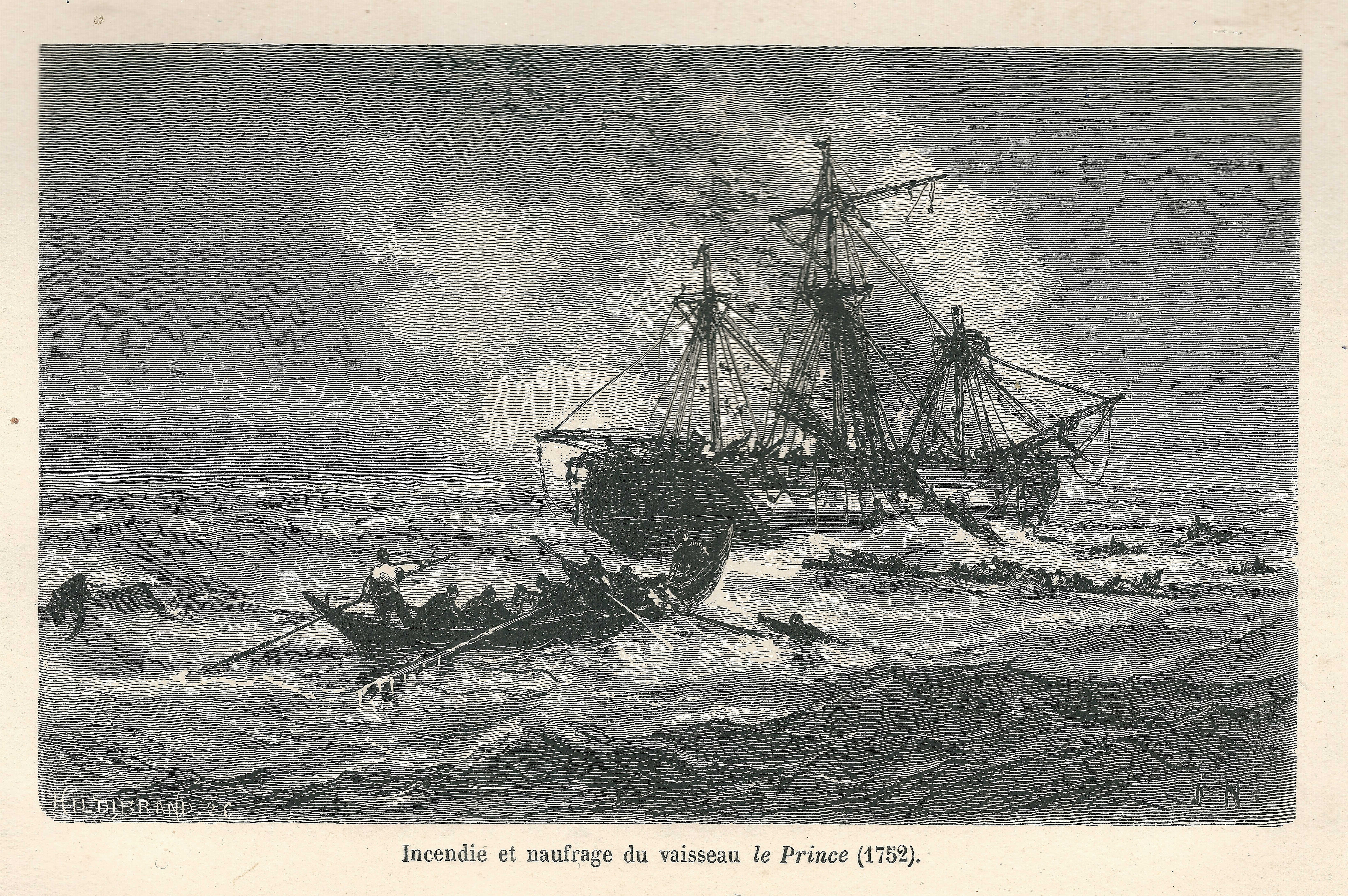 Gravure de Jules Noël tirée de : Zurcher & Margollé, Les Naufrages célèbres, Paris : Hachette, 3e édition, 1877 -- Incendie & naufrage, en pleine mer, du vaisseau de la Compagnie des Indes, le Prince, en 1752